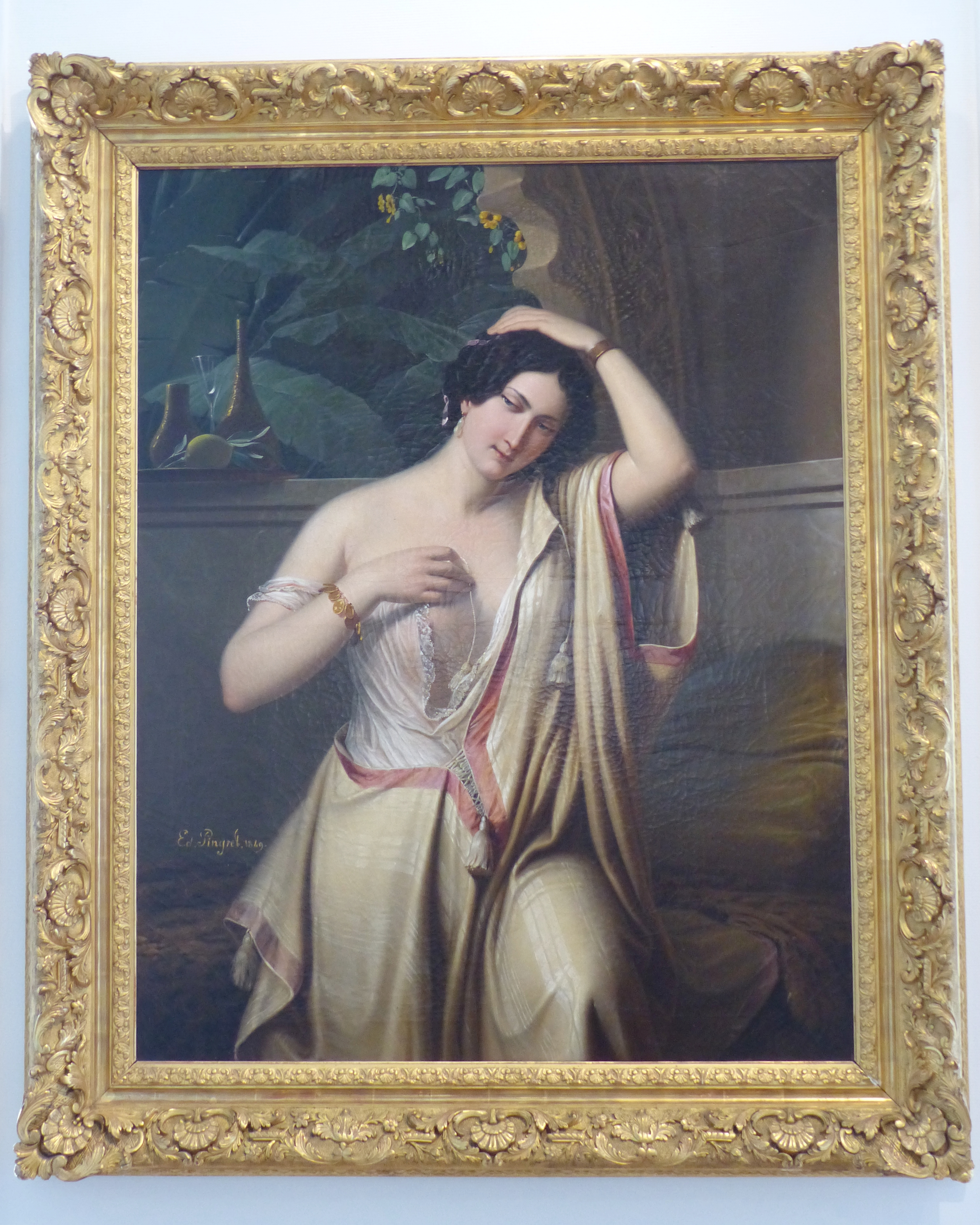 Nice (Alpes-Maritimes, France), sur la promenade des Anglais, la Villa (palais plutôt) Masséna, siège du musée du même nom. L'Almée par Édouard Henri Théophile Pingret (1786-1869) en 1849.